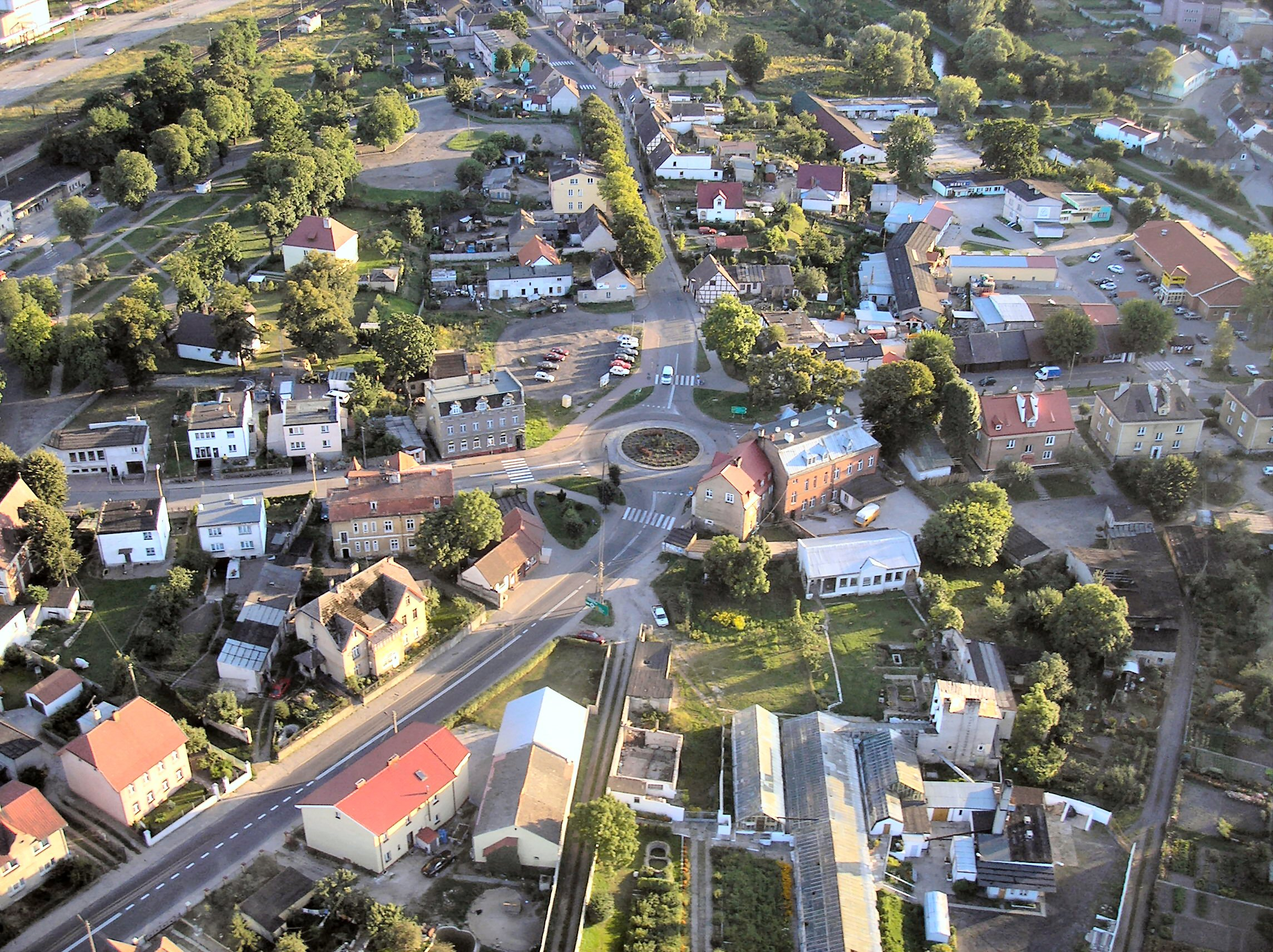 Łobez - okolice poczty - rondo